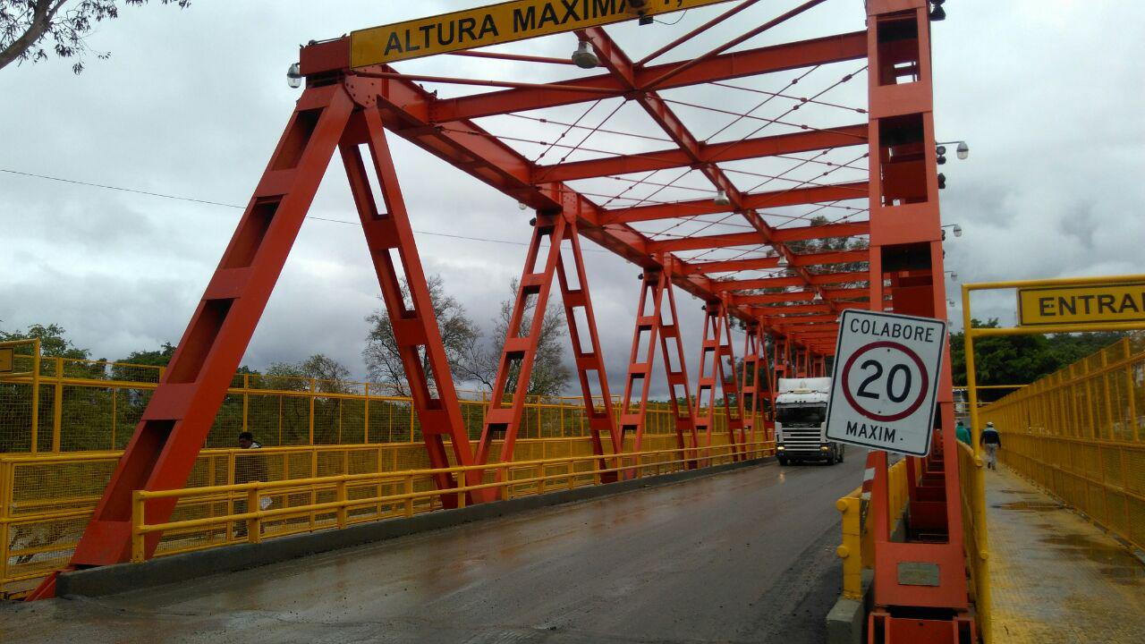 Vista del Puente San Ignacio de Loyola que cruza el río Pilcomayo desde la cabecera del lado paraguayo